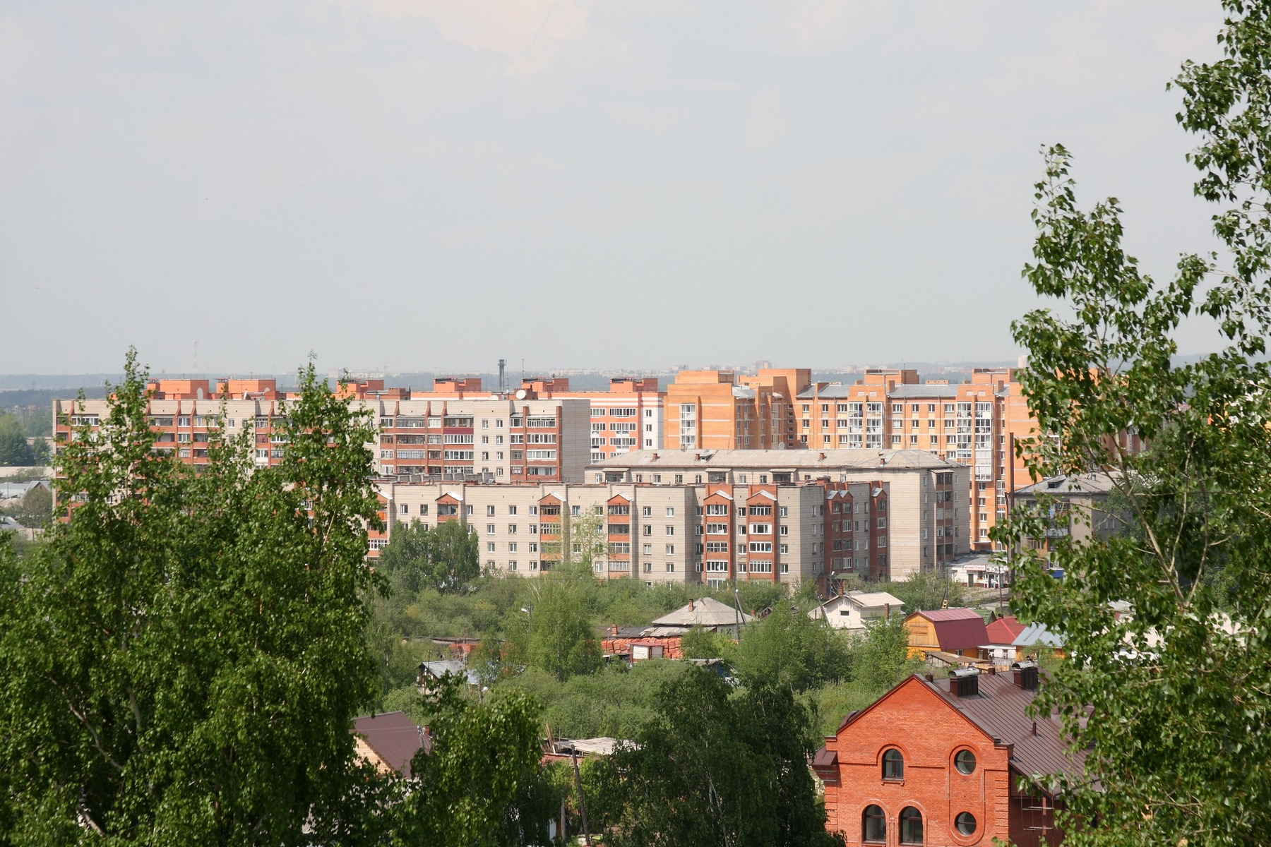 Tomsk, Tomsk Oblast, Russia